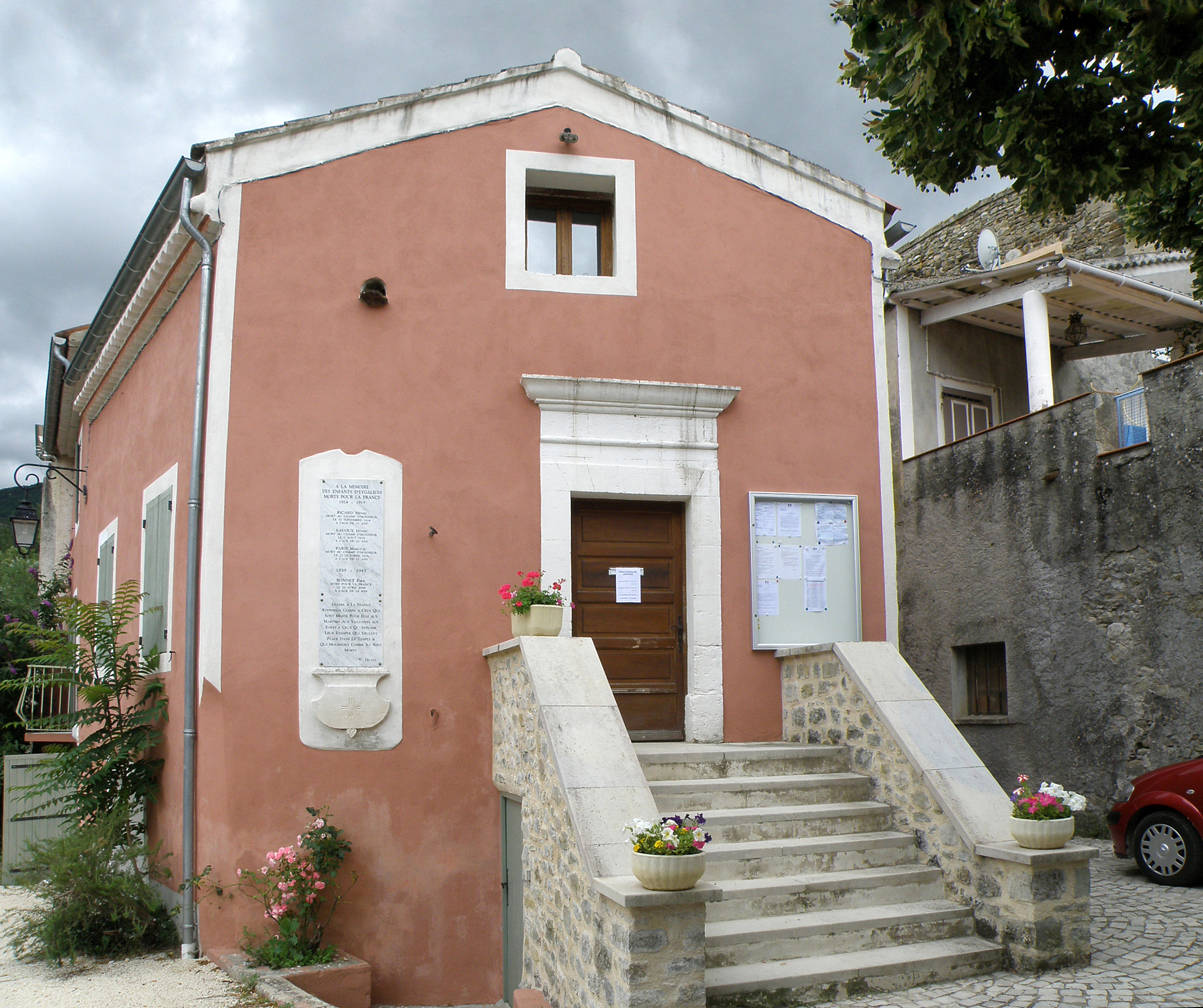 Eygaliers (Drôme, France). Mairie.